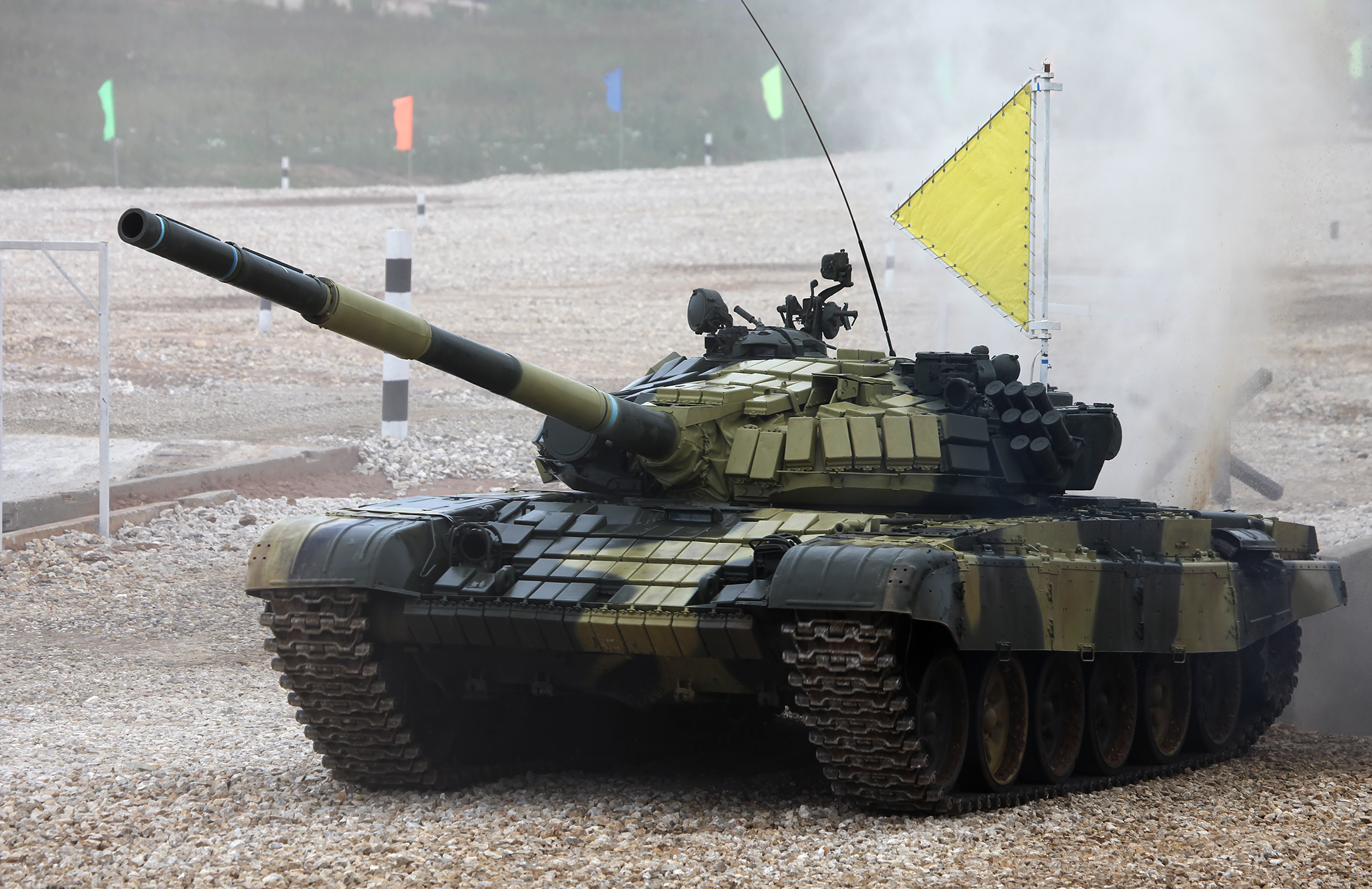 Т-72Б